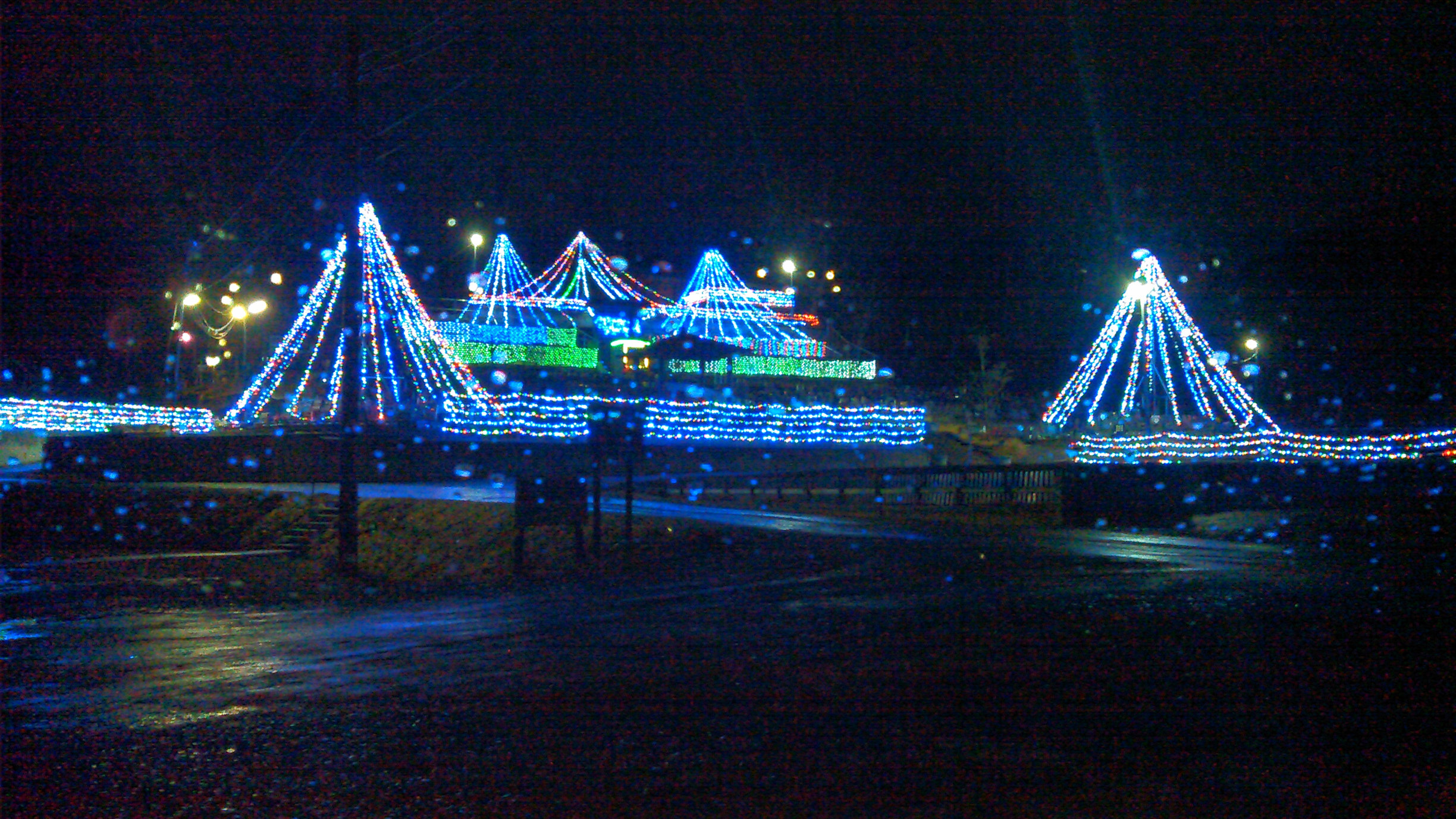 郡山市三穂田町 みちのくペット霊園 イルミネーション